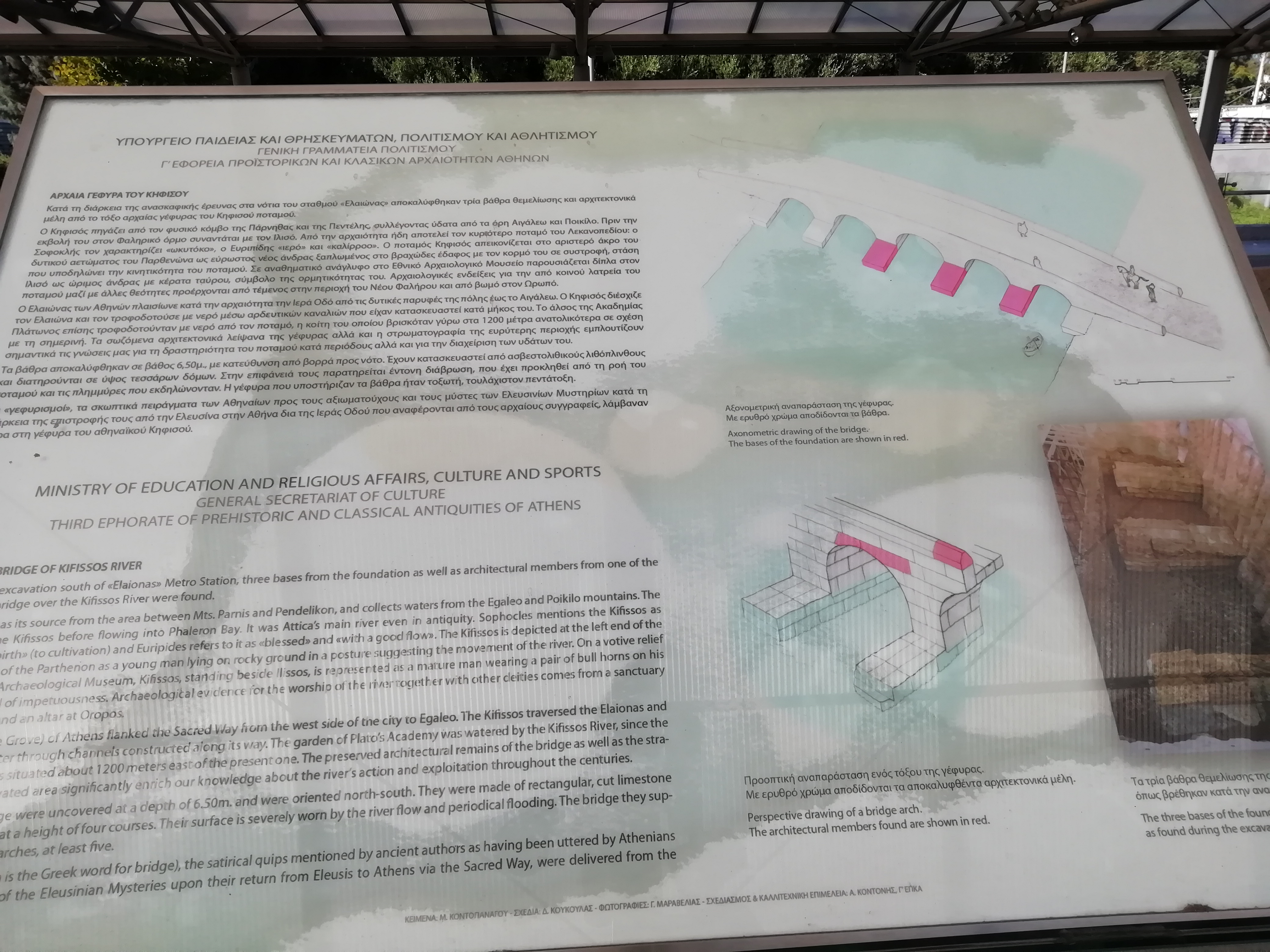 Σήμανση στο σημείο όπου ανακαλύφθηκε η αρχαία γέφυρα του Κηφισού στον Ελαιώνα.